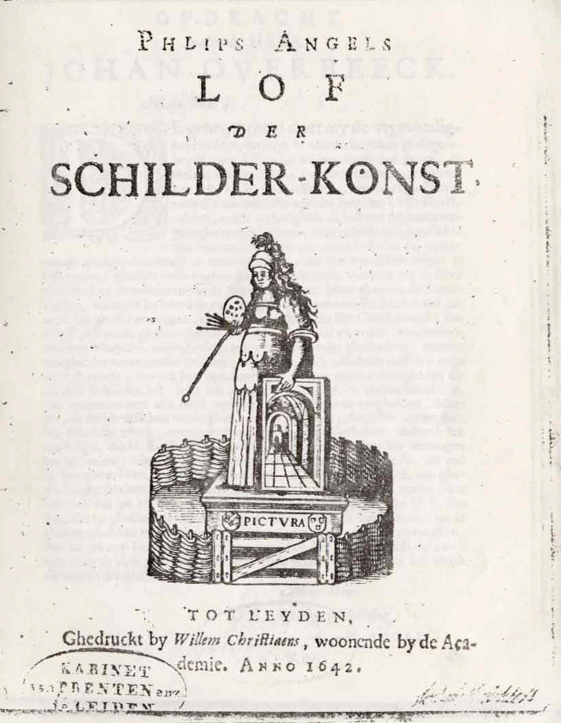 Lof der Schilder-Konst, title